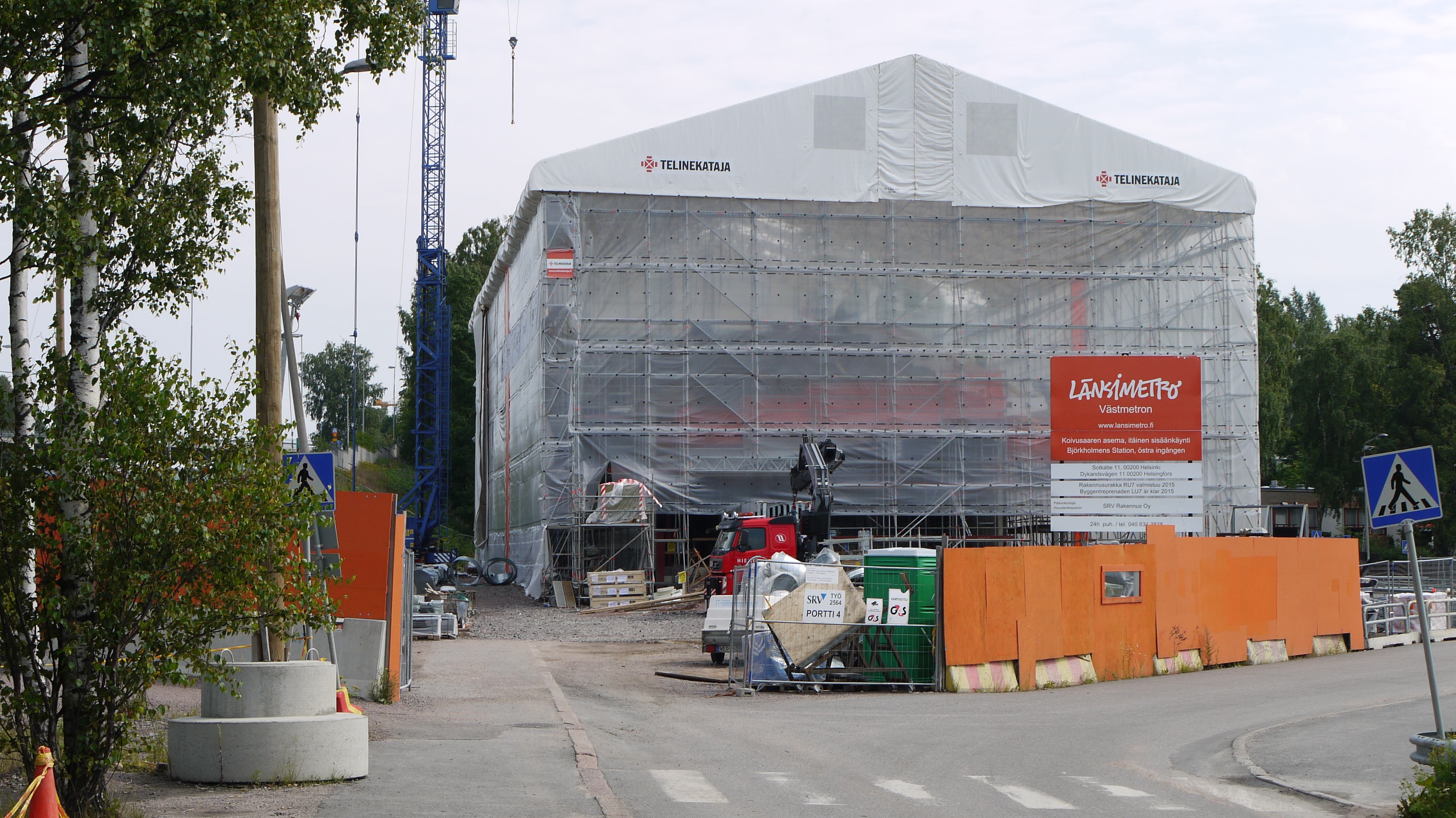 Koivusaaren metroaseman itäisen sisäänkäynnin rakennustyömaa